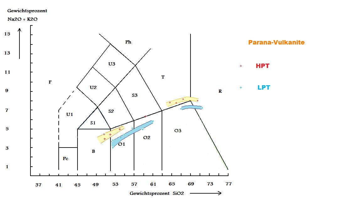 Parana volcanic series (flood basalts)